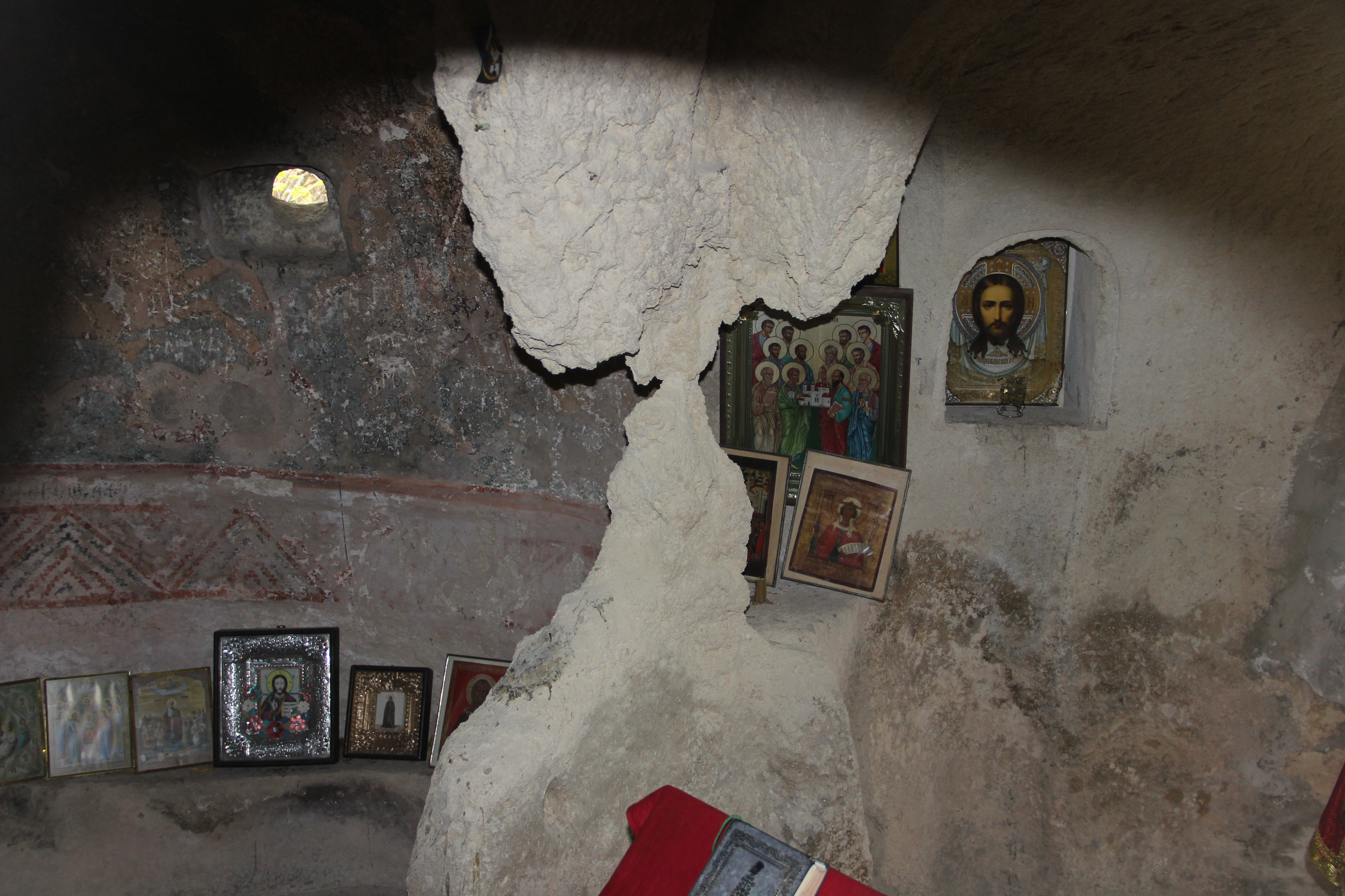 Внутри Храма Трех всадников. Эски-Кермен. Бахчисарайский р-н. Крым. Россия. Сентябрь 2014